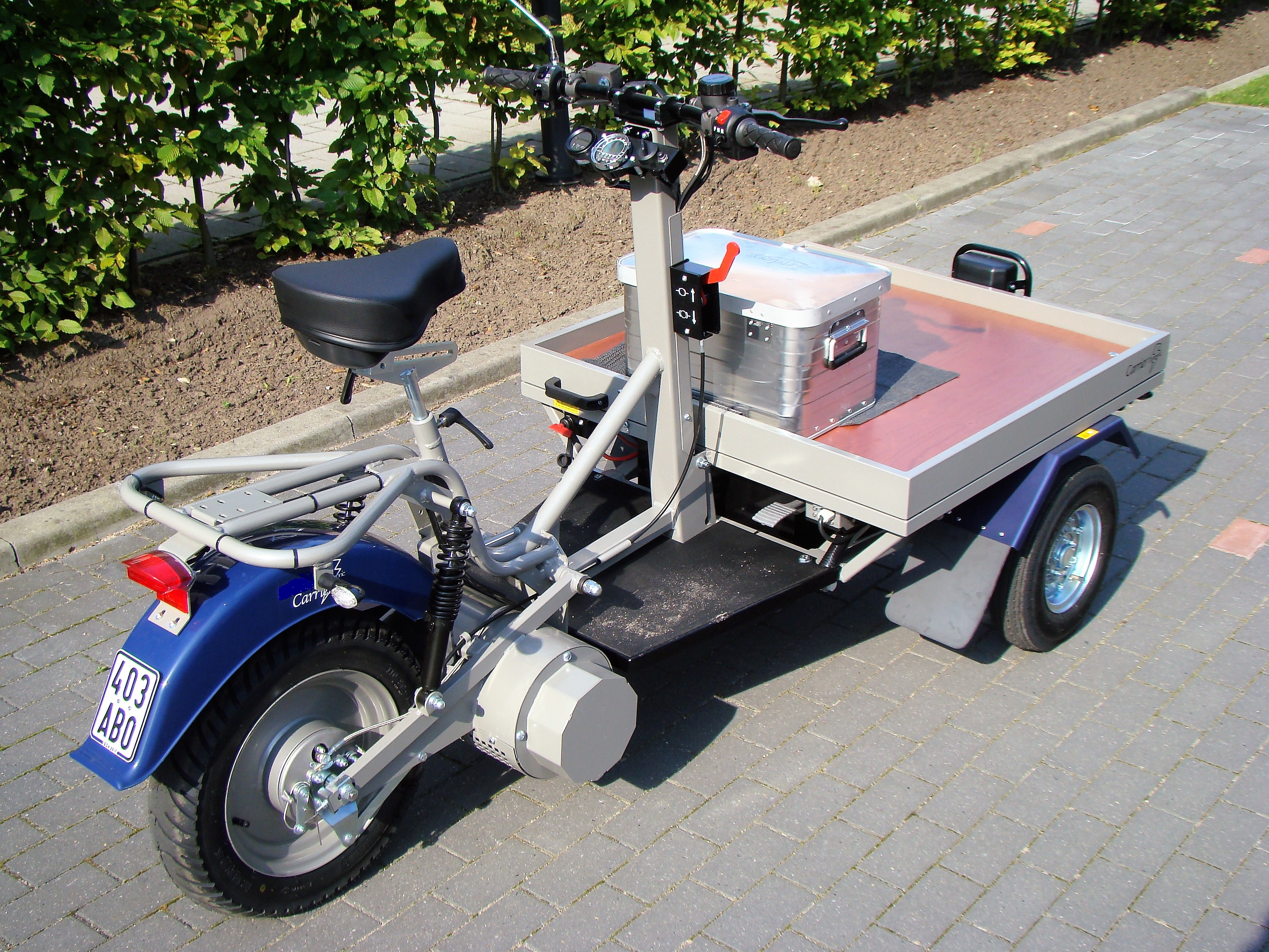 blaues Flakmoped - Norsjö Carrier